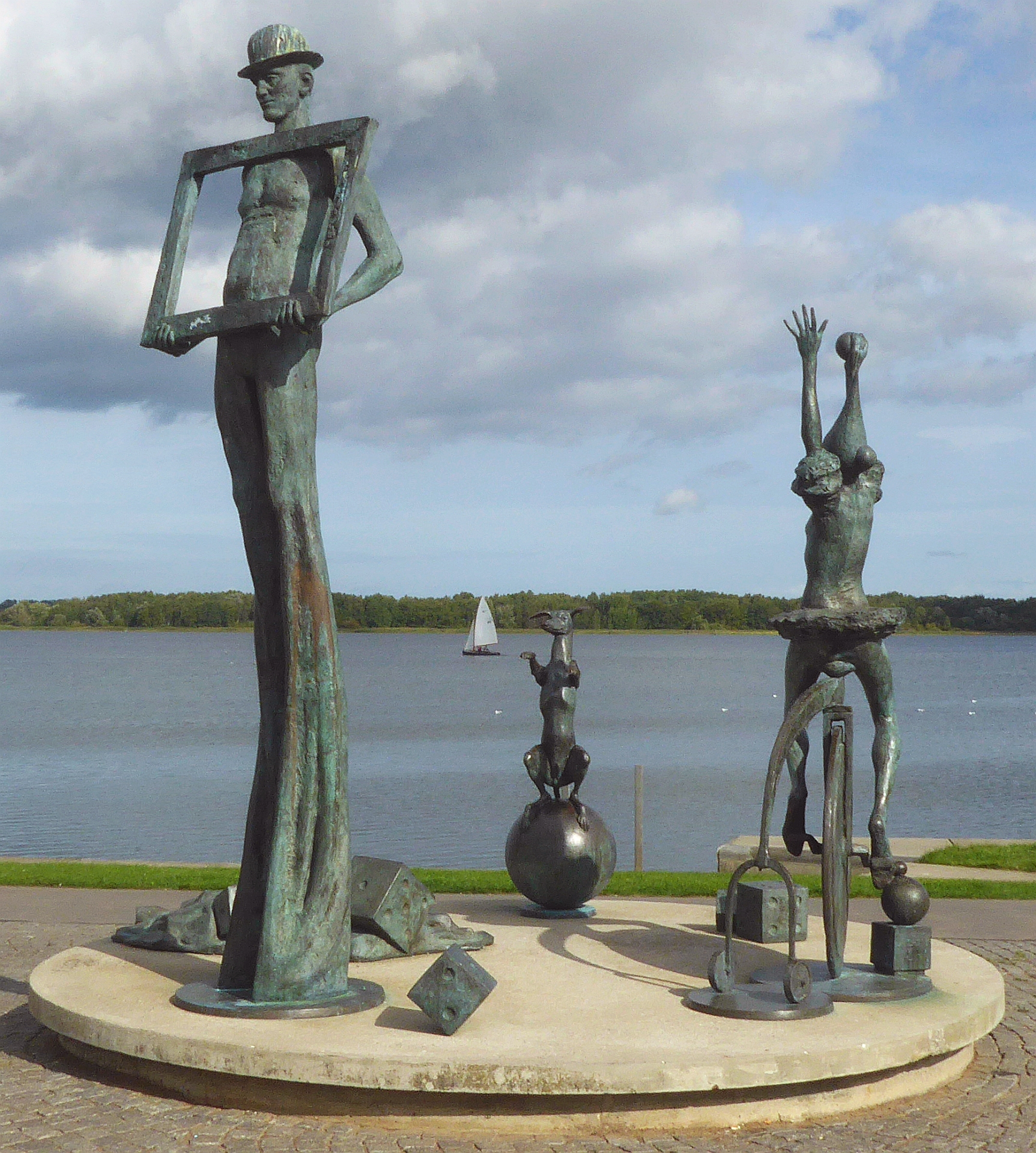 Ribnitz am Saaler Bodden Der Zirkus kommt 2009 ca 4 m hohe Skulptur Prof Jo Jastram - Foto 2018 Wolfgang Pehlemann P1260598